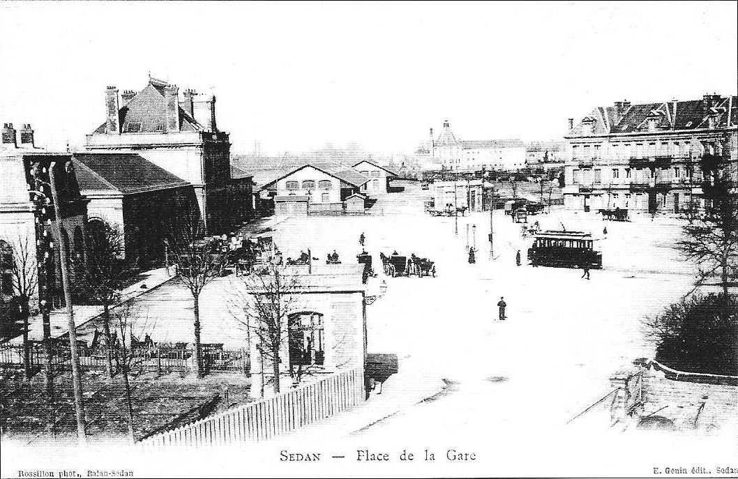 Vue sur la_gare_de Sedan,_sa_place_et l'ancien octroi.